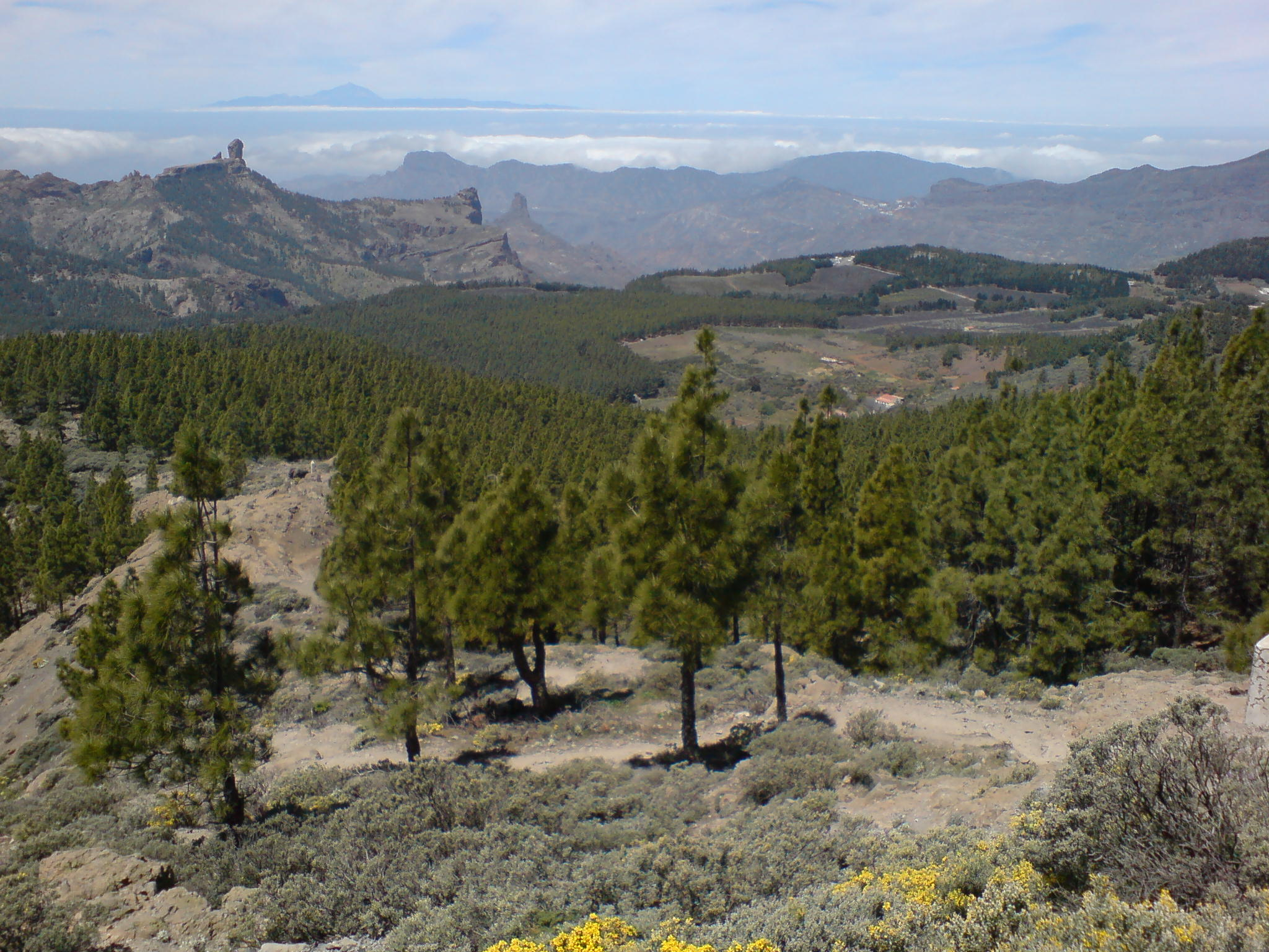 Los Llanos de La Pez desde el pico de Las Nieves (Gran Canaria). Al fondo el Roque Nublo. el Bentayga y, más allá, el Pico Teide (en Tenerife)